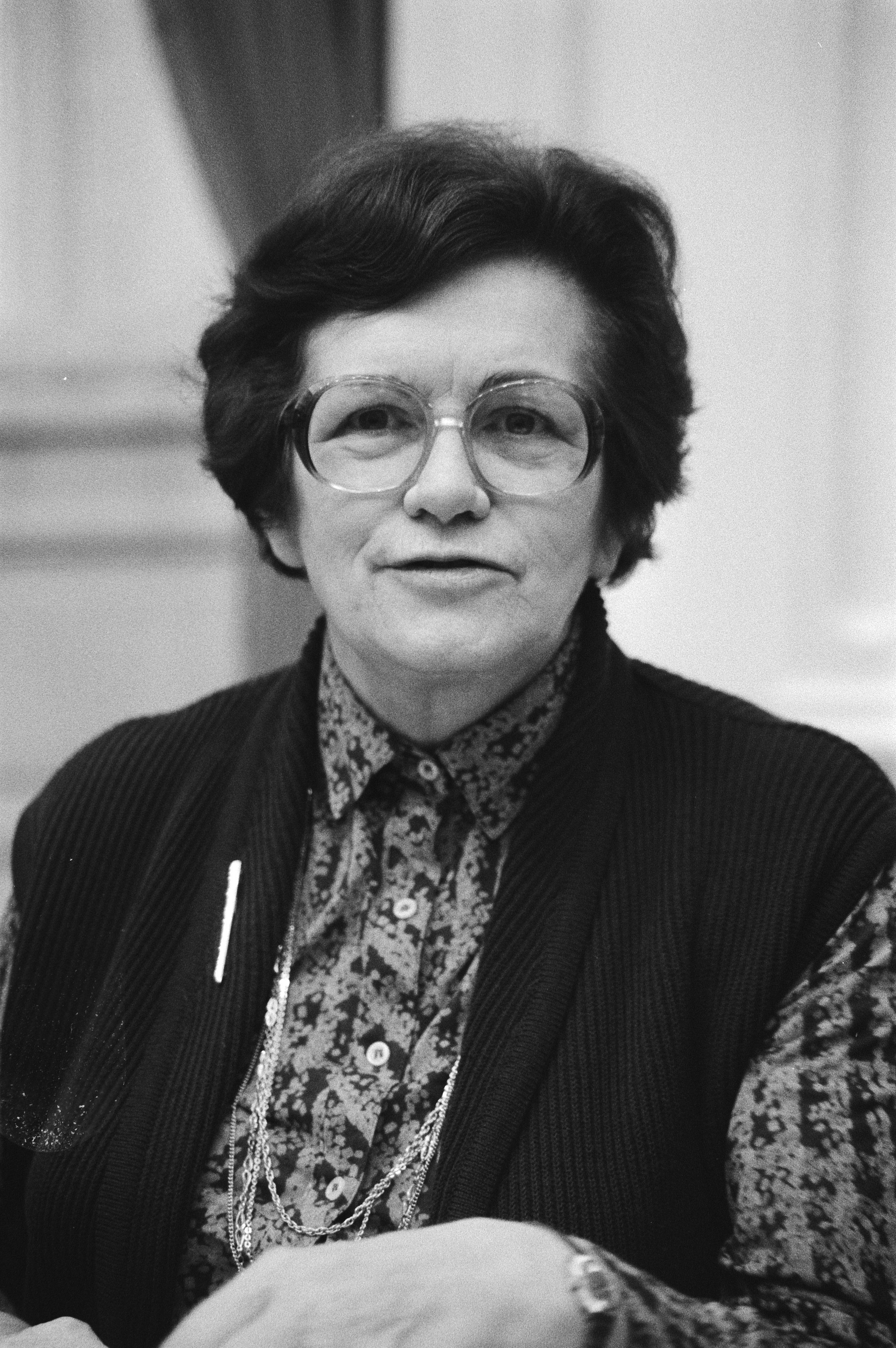 Collectie / Archief : Fotocollectie Anefo Reportage / Serie : [ onbekend ] Beschrijving : Dien Cornelissen tijdens de vergadering van de vaste kamercommissie voor ontwikkelingssamenwerking over de nota EG-beleid Datum : 2 februari 1981 Locatie : Binnenhof, Den Haag, Zuid-Holland Trefwoorden : brillen, parlementariërs, portretten, vergaderingen, voorzitters Persoonsnaam : Cornelissen, Dien Fotograaf : Dijk, Hans van / Anefo, [onbekend] Auteursrechthebbende : Nationaal Archief Materiaalsoort : Negatief (zwart/wit) Nummer archiefinventaris : bekijk toegang 2.24.01.05 Bestanddeelnummer : 931-2991